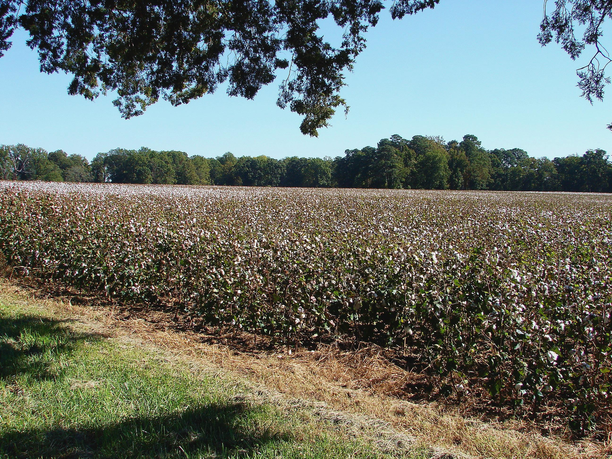 Sierra Exif JPEG